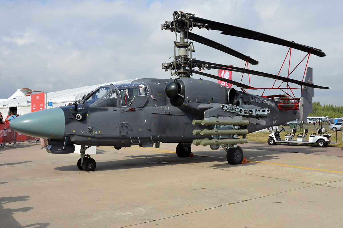 Russian Navy, Kamov, Ka-52K